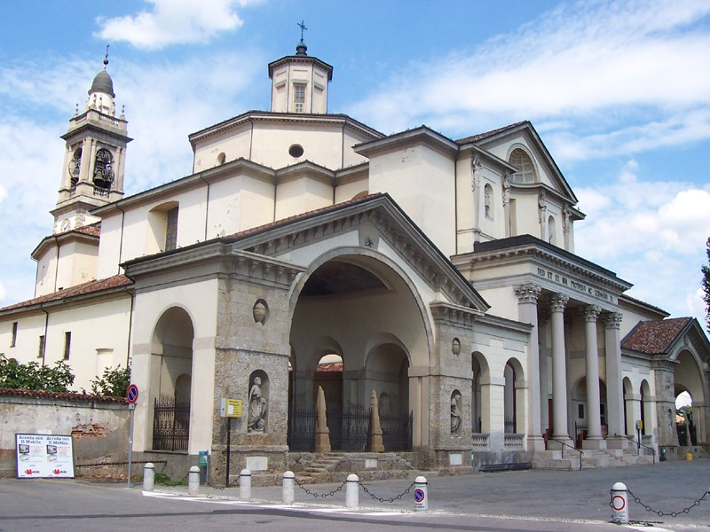 Gorgonzola - Chiesa Parrocchiale dei Ss. Gervasio e Protasio